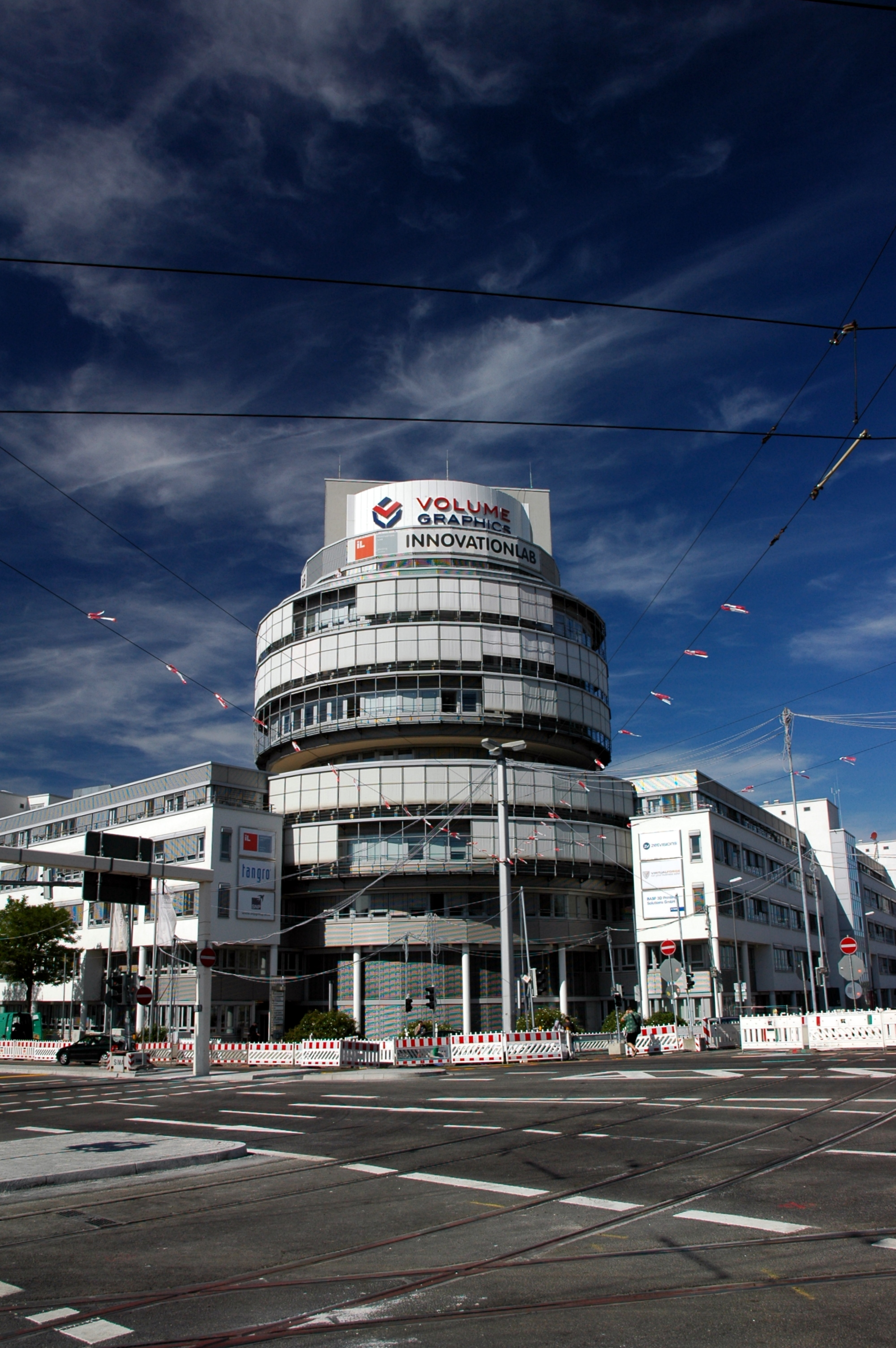 Heidelberg-Bahnstadt - Reutax Tower